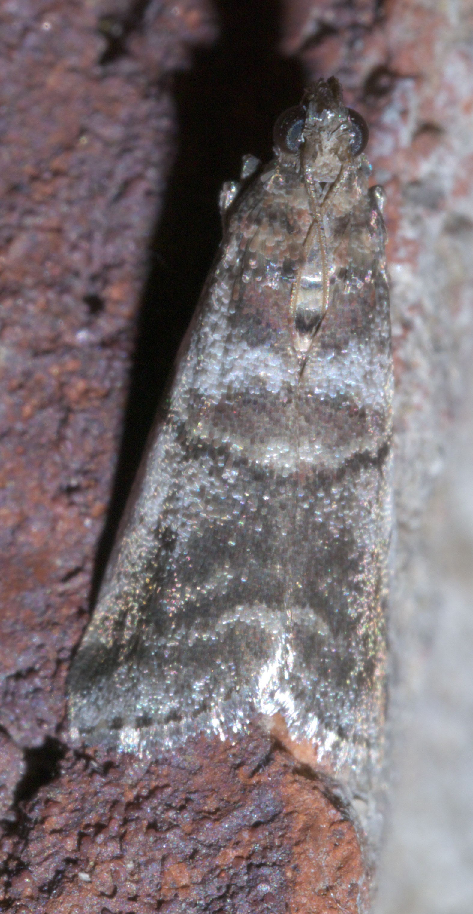 Acrobasis indigenella, leaf crumpler, Size: 8.6 mm, ID Confidence: 88